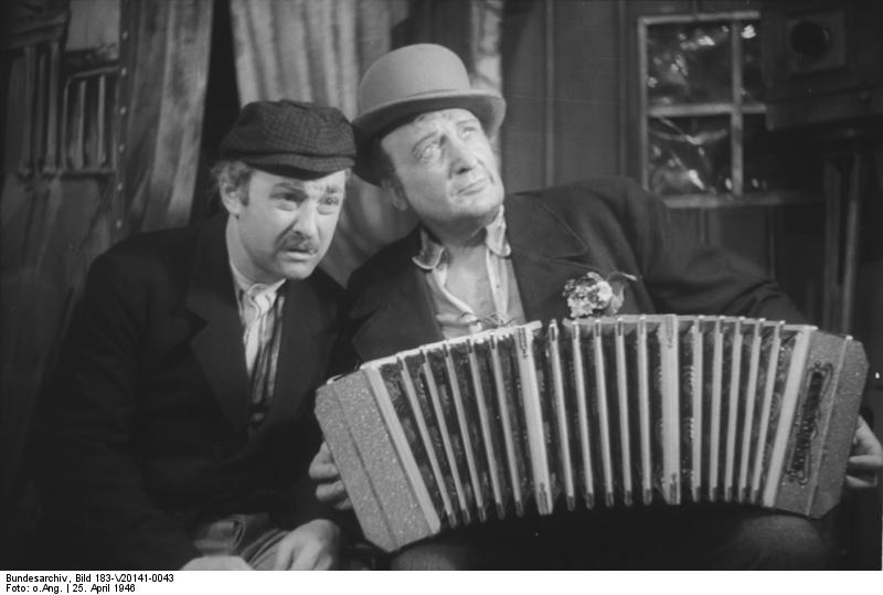 Zentralbild Generalprobe zu "Liliom" im Berliner Hebbeltheater am 25.4.1946 mit Hans Albers als Liliom.